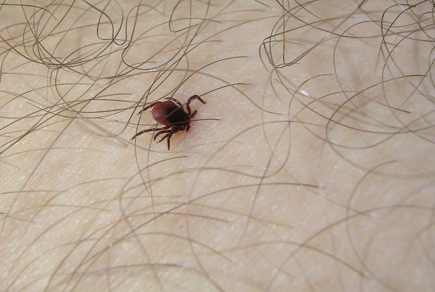 (en) Tick (Ixodes ricinus) on a leg (de) Gemeiner Holzbock (Ixodes ricinus) an Bein Place/Ort: Berner Oberland, CH. Meiringen.